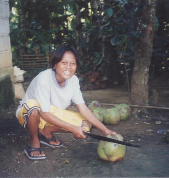 bolo in use